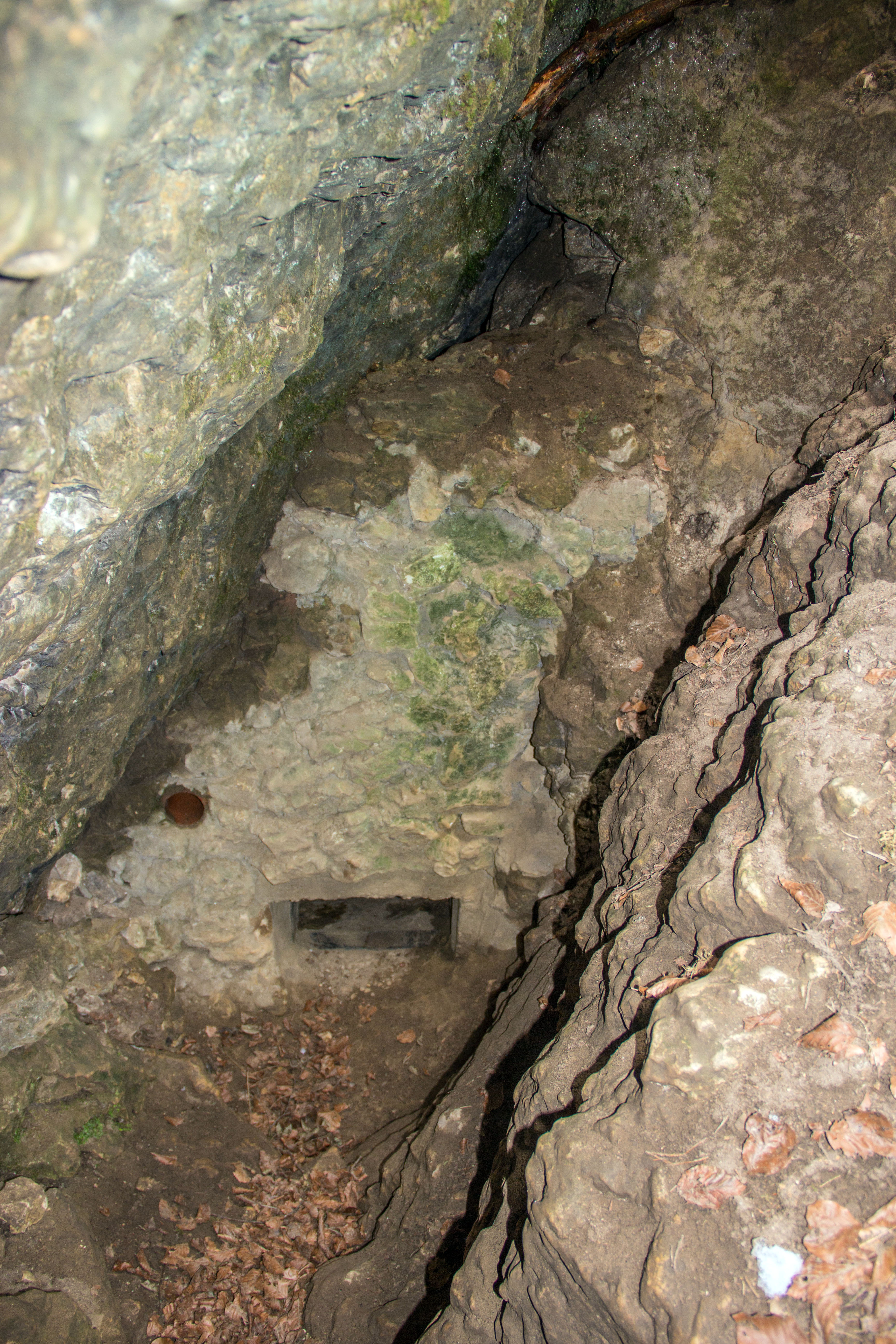 Alfeld, Windloch, E 11